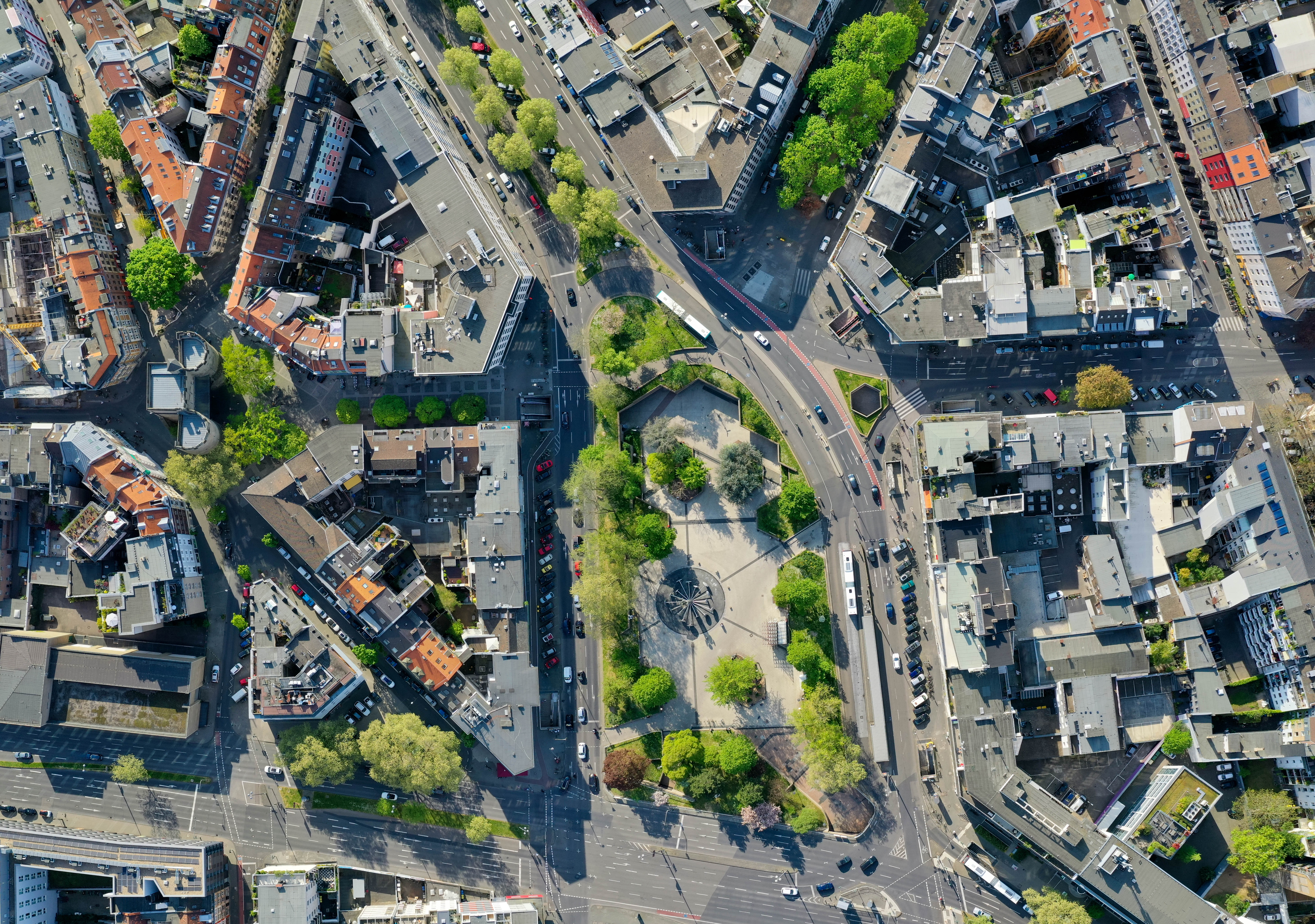 Ebertplatz Köln im April 2020 – Drohnenaufnahme aus 200 m Höhe. Die Blickrichtung (oben) ist nach Westen. Oben rechts im Bild der Sudermannplatz, links davon der Hansaring, ganz links der Eigelstein, unten die Nord-Süd-Fahrt. Der Rhein (hier nicht zu sehen) befindet sich einige hundert Meter westlich, also in Fortsetzung des Bilds nach unten. Es lagen für diesen ungewöhnlich hohen Dokumentationsflug Genehmigungen der Deutschen Flugsicherung, der Stadt Köln und der Bezirksregierung Düsseldorf vor. Bei Verwendung dieses Fotos ist es zwingend notwendig, Ross und Reiter zu nennen, also den exakten Link zu dieser Webseite und den Fotografen.